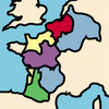 karta; egen produktion